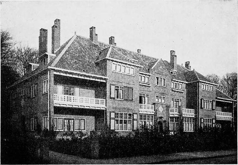 J.B. (Han) van Loghem. Driedubbel woonhuis, Oosterhoutpark, Haarlem (voorheen Heemstede). 1910-1911. Foto afkomstig uit Bouwkundig Weekblad, 32e jaargang, numer 1 (6 januari 1912): p. 4.